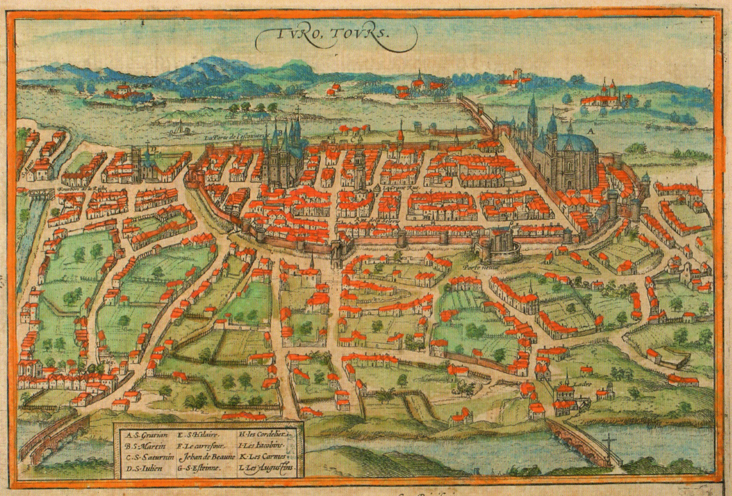 Vue de Tours au XVI° siècle, extraite de Civitates Orbis terrarium, chez Braun à Cologne (Bibliothèque municipale de Tours) - Publié également dans H. Galinié, Tours antique et médiéval, FERACF, 2007, 1008, p. 310